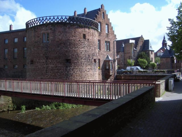 Die Mühltorbrücke bildet den östlichen Zugang zur Altstadt Büdingens